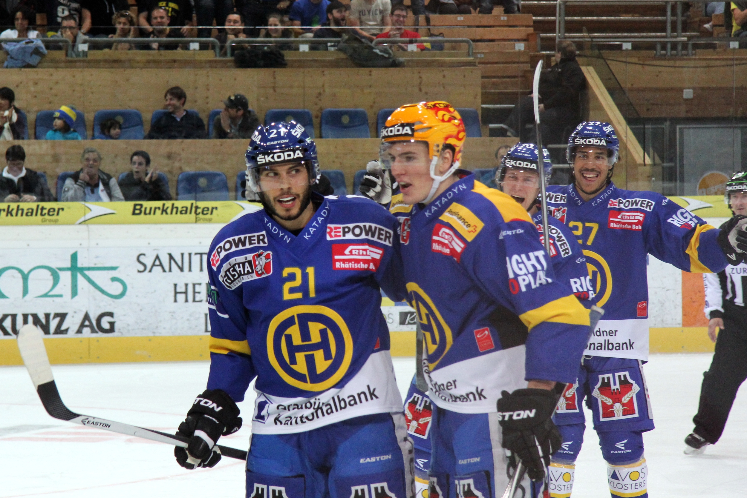 Mauro Jörg (D 21), Dario Simion (D 59, TS), Enzo Corvi (D 70), Samuel Gerra (D 27).